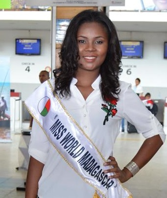 Miss Monde Madagascar 2017 Tirindraza Felana